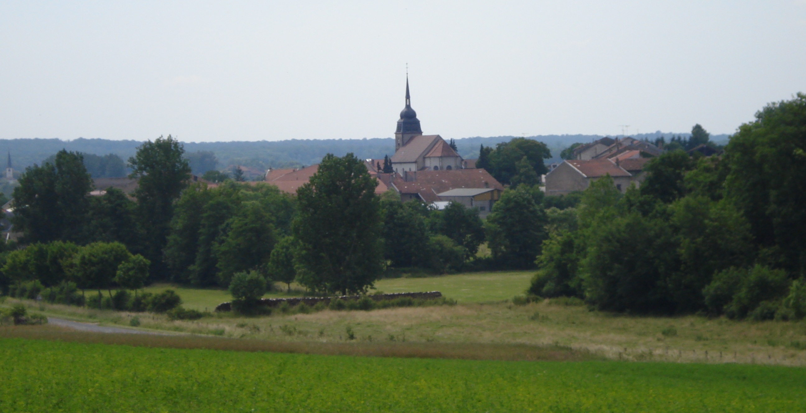 Vue du village de Domjevin depuis la route de Blémerey